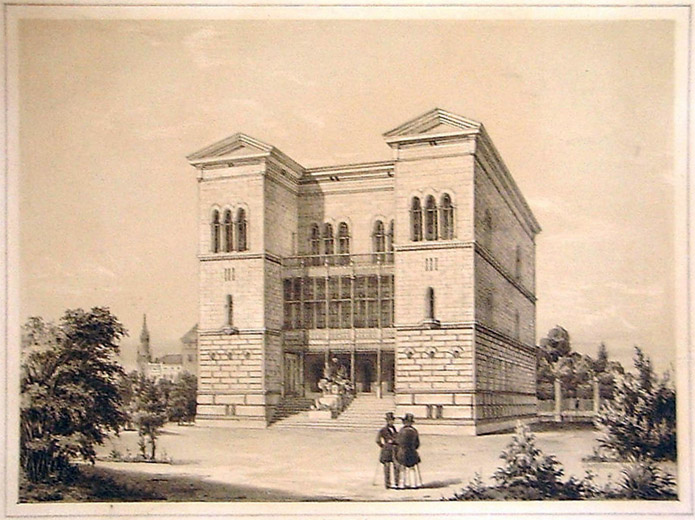 Neues Logenhaus zu Leipzig (Freimaurerlogen Apollo und Balduin zur Linde, Elsterstraße 2)